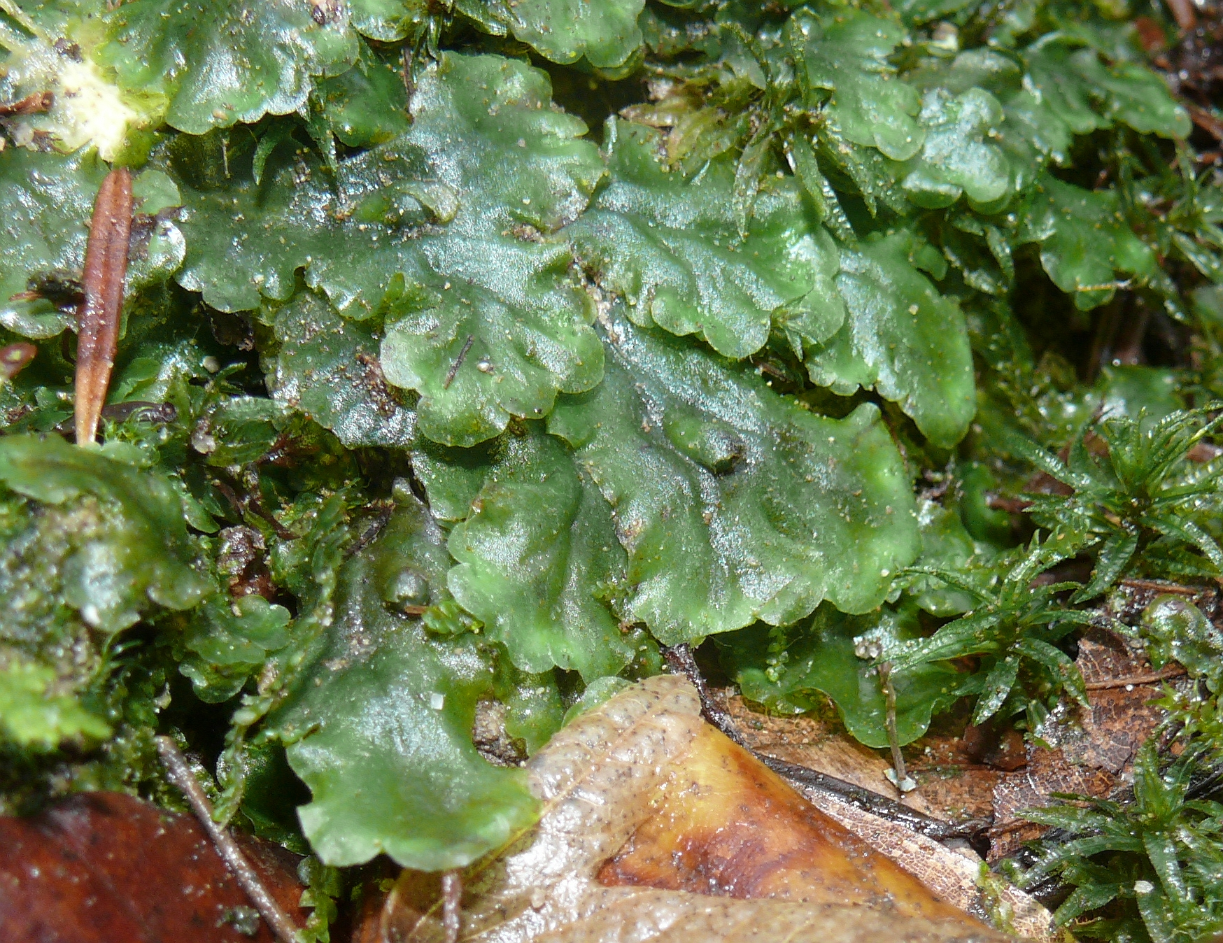 Pellia epiphylla, Schwäbisch-Fränkische Waldberge, Germany